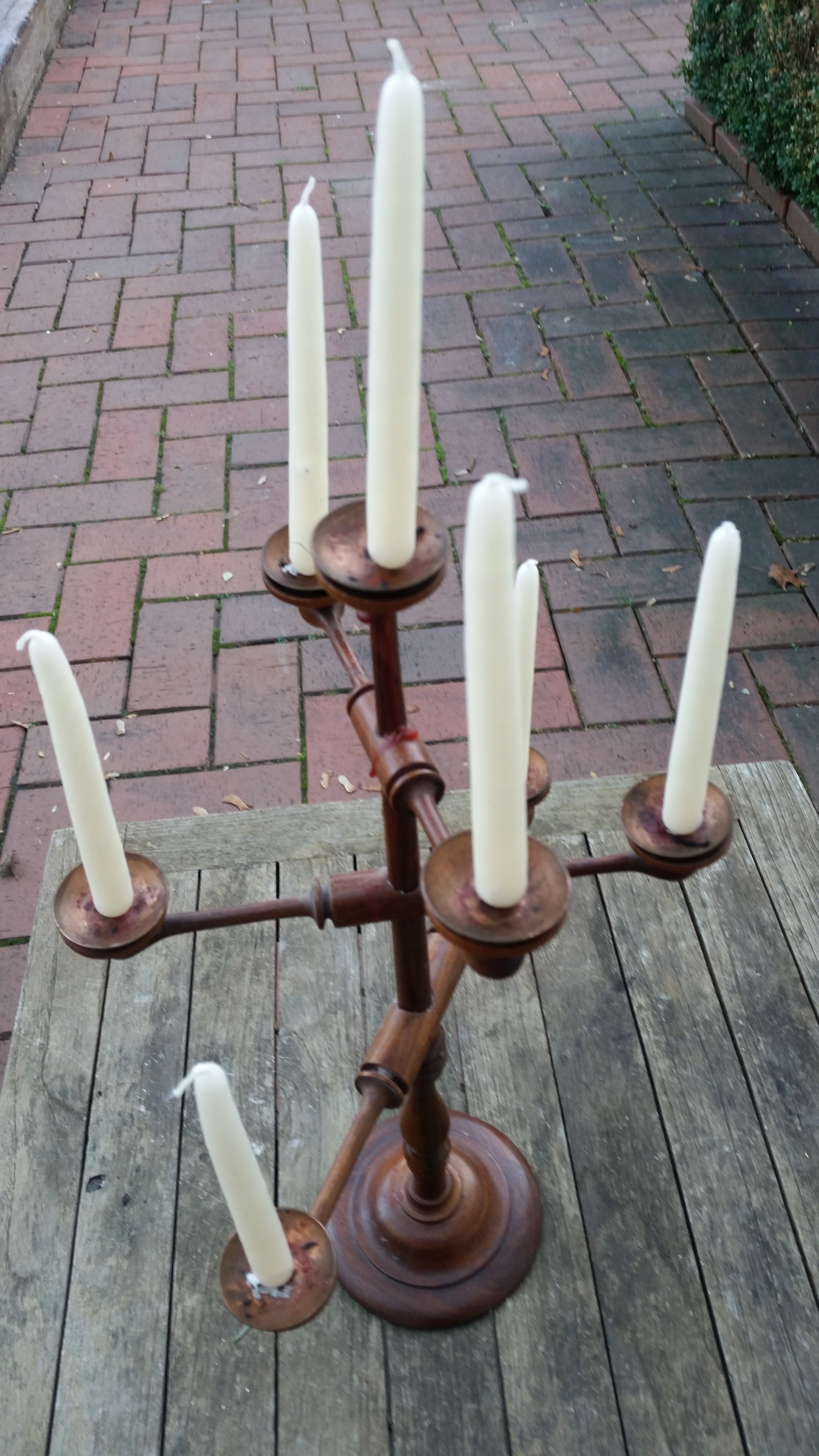 Aus dunklem Holz gedrechselte Ausführung mit Kupferschälchen unter den Kerzen